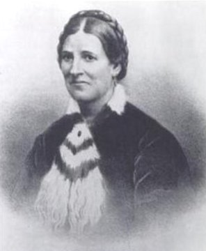 Regina Dal Cin (San Vendemiano, 4 aprile 1819 – Cappella Maggiore, 15 agosto 1897). Osteopata italiana esperta nella pratica della ricomposizione delle lussazioni femorali.